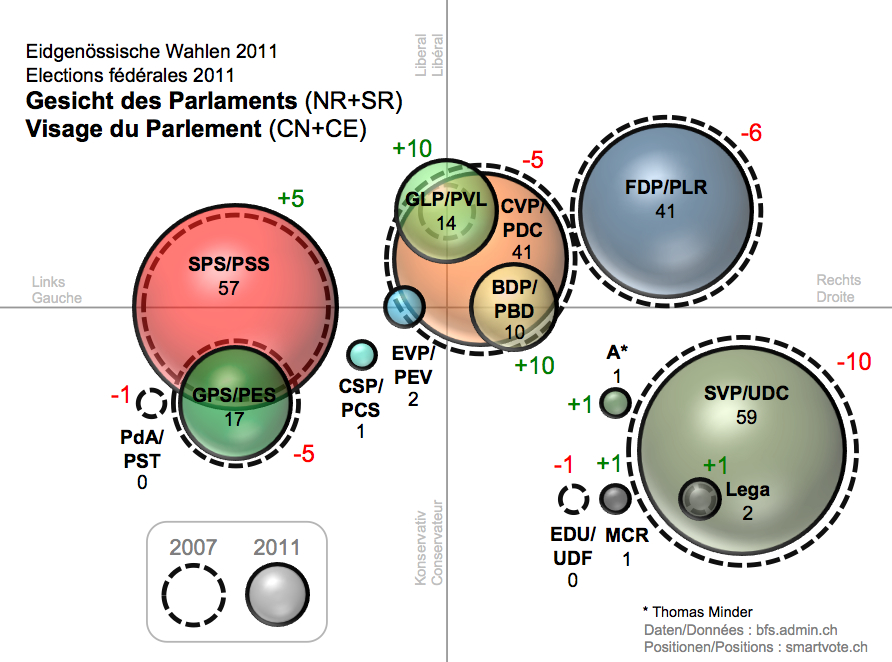 Comparaison des résultats des partis représentés aux Chambres fédérales suisses en 2007 et 2011 (Conseil national et Conseil des Etats)